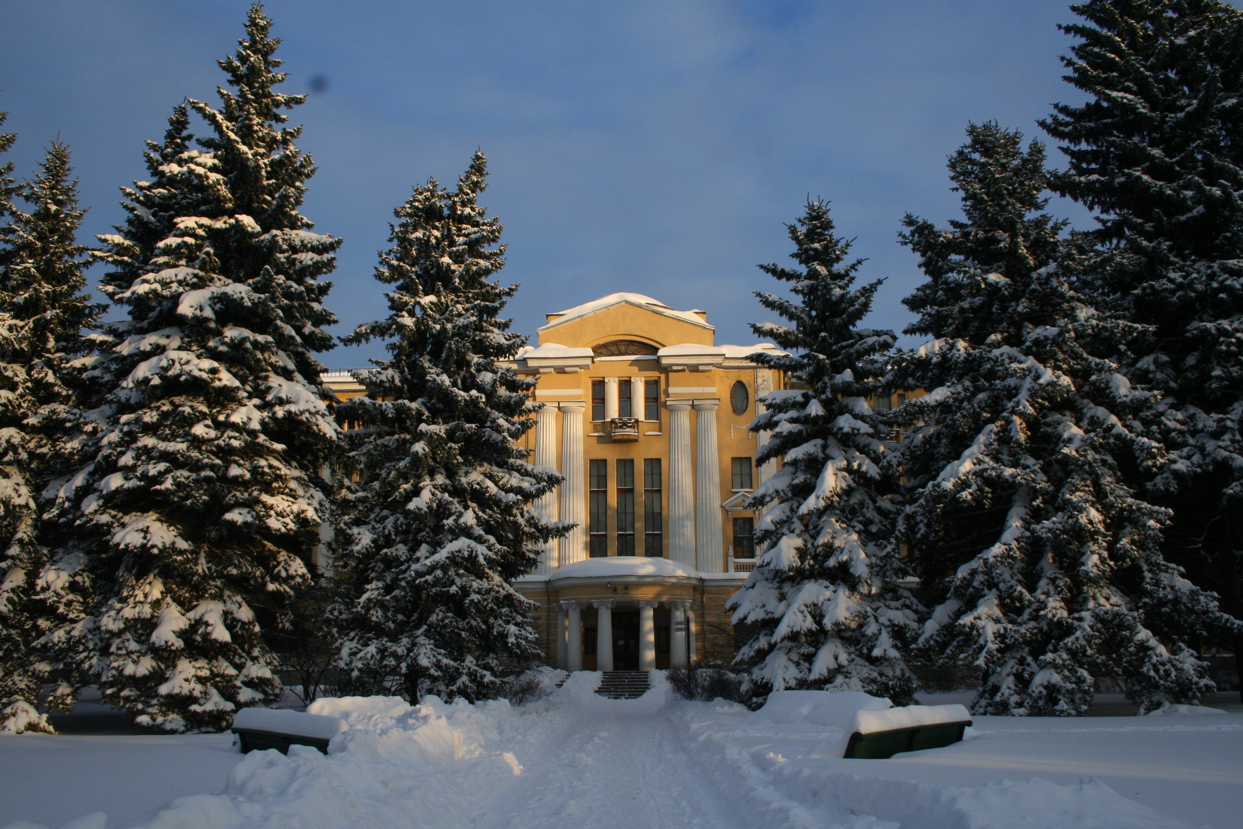 Гербарий Ботанического института им. В. Л. Комарова РАН